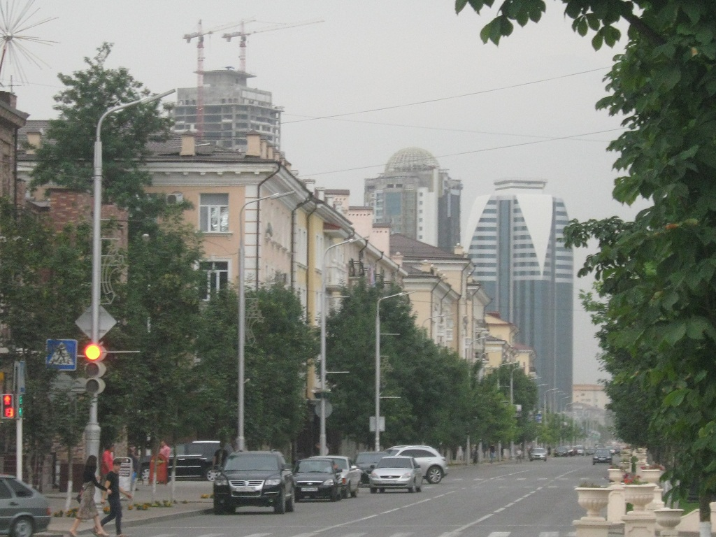 Проспект Путина